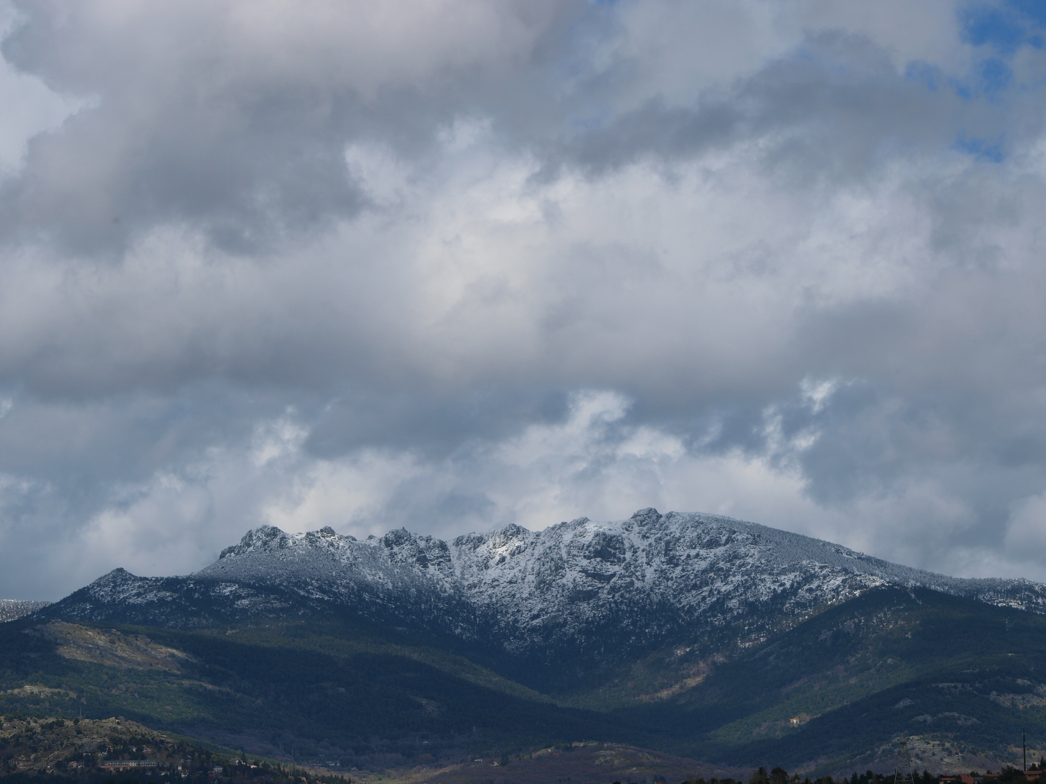 Siete Picos. Sierra de Guadarrama (Madrid)